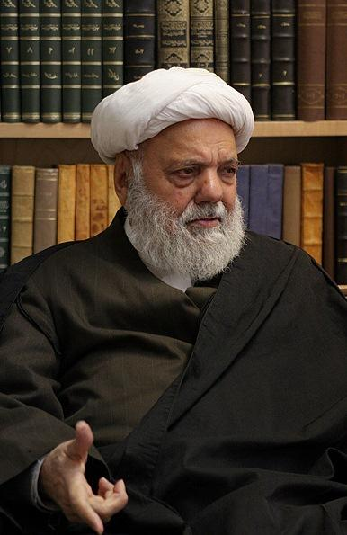 شیخ عزیزالله عطاردی